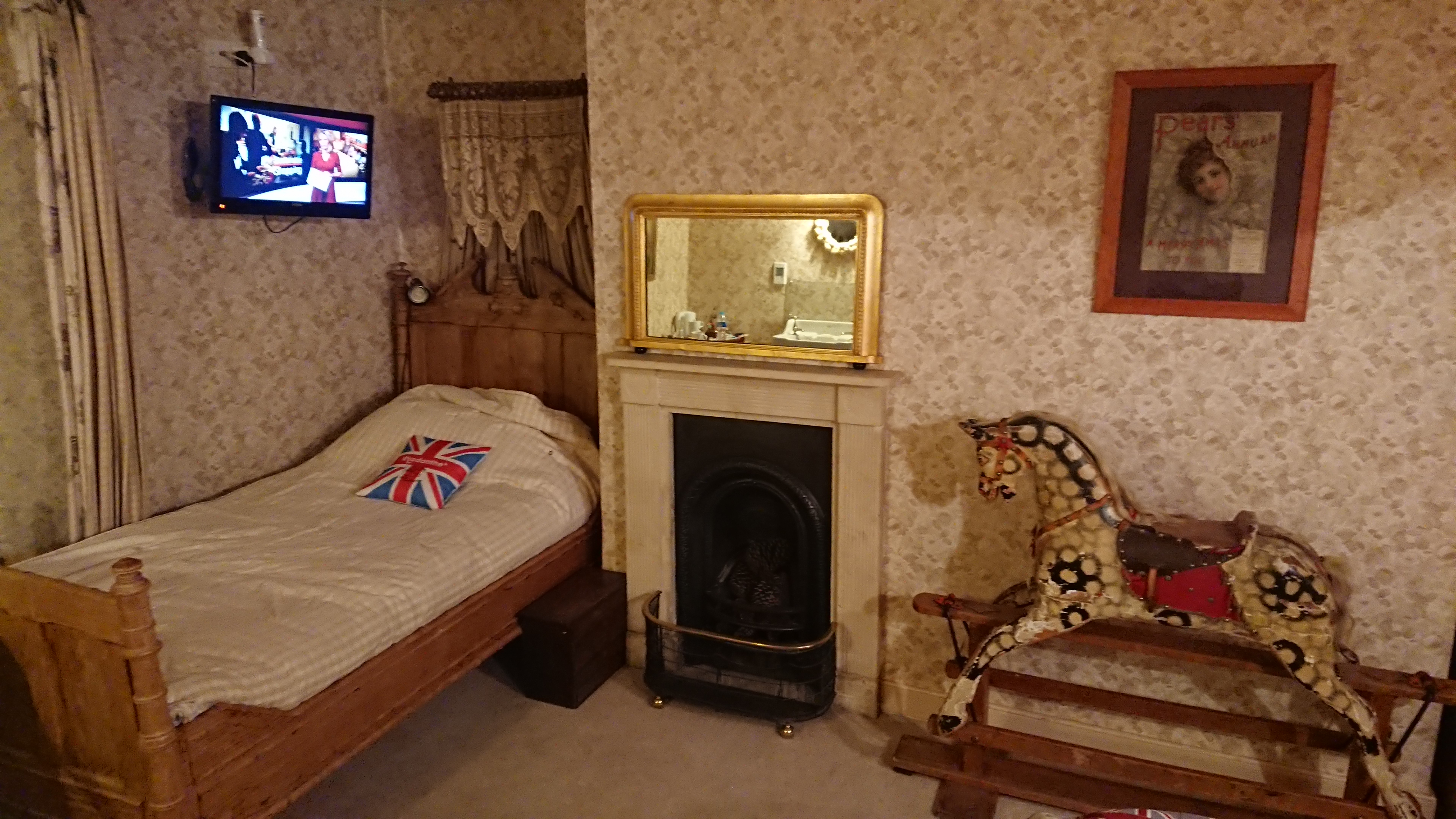 フォス・ファームハウス、パインルームにて。